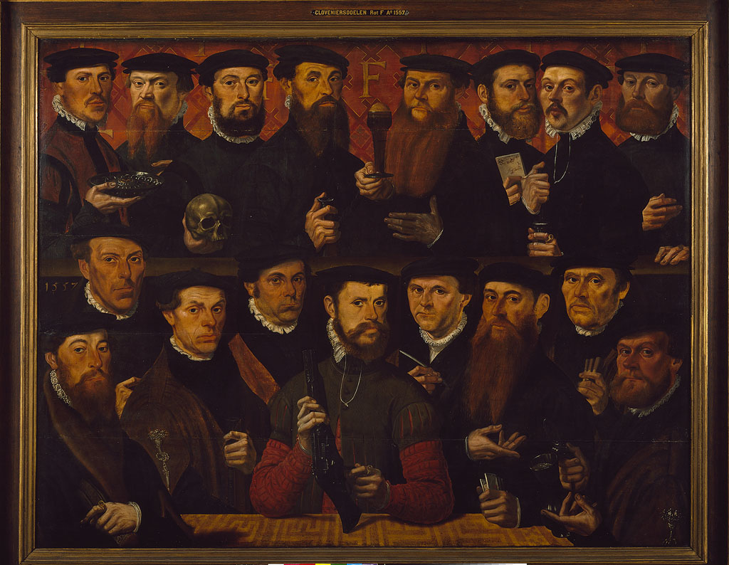 schilderij; Kloveniersdoelen; portret; groepsportret; schuttersstuk